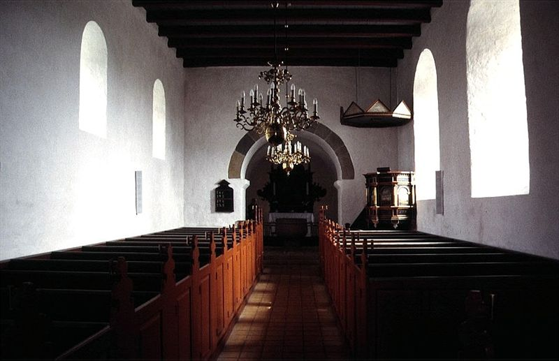 Lihme Kirke, (Skive Kommune), Kirkerummet